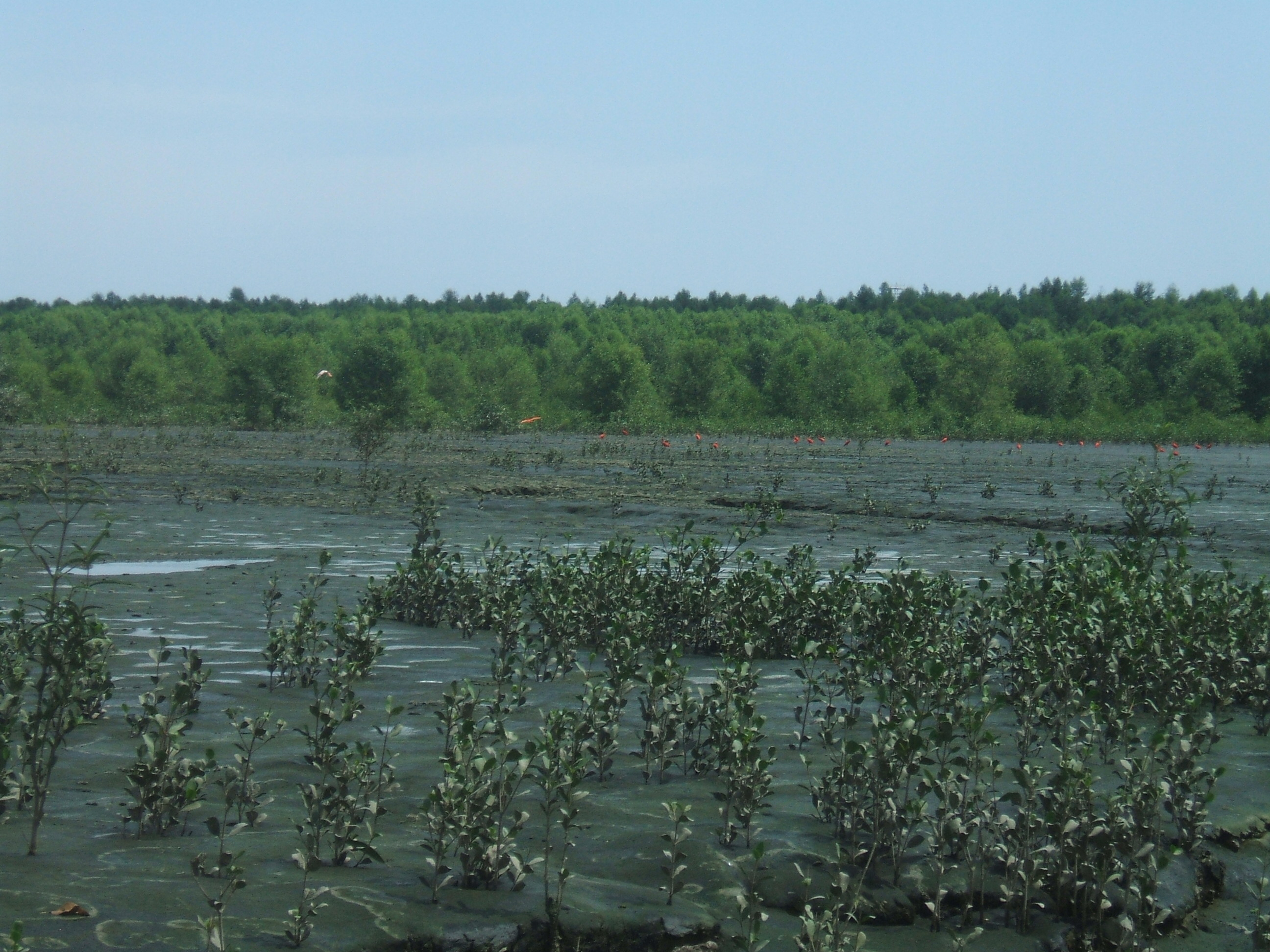 manguezal de siriúba - Avicennia schaueriana, em formação